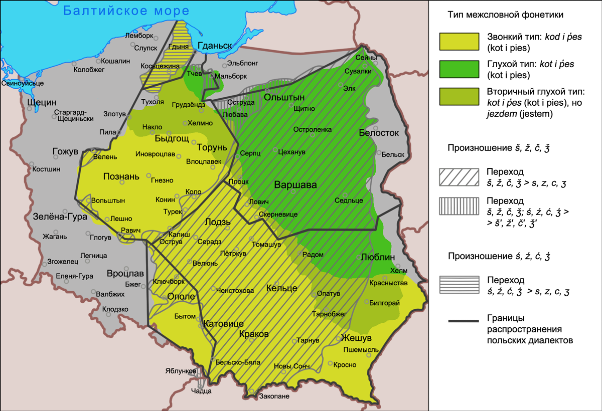 Карта распространения типов сандхи, мазурения, яблонкования и кашубения в польских диалектах. Источники: Gwary polskie. Przewodnik multimedialny pod redakcją Haliny Karaś. Leksykon. Mazurzenie Gwary polskie. Przewodnik multimedialny pod redakcją Haliny Karaś. Leksykon. Fonetyka międzywyrazowa zróżnicowana regionalnie